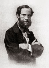 БАЛАБИН Виктор Петрович Посланник России в Австрии 1860-1864